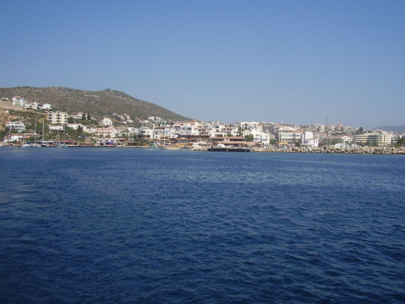 Datça coast - Muğla, Turkey